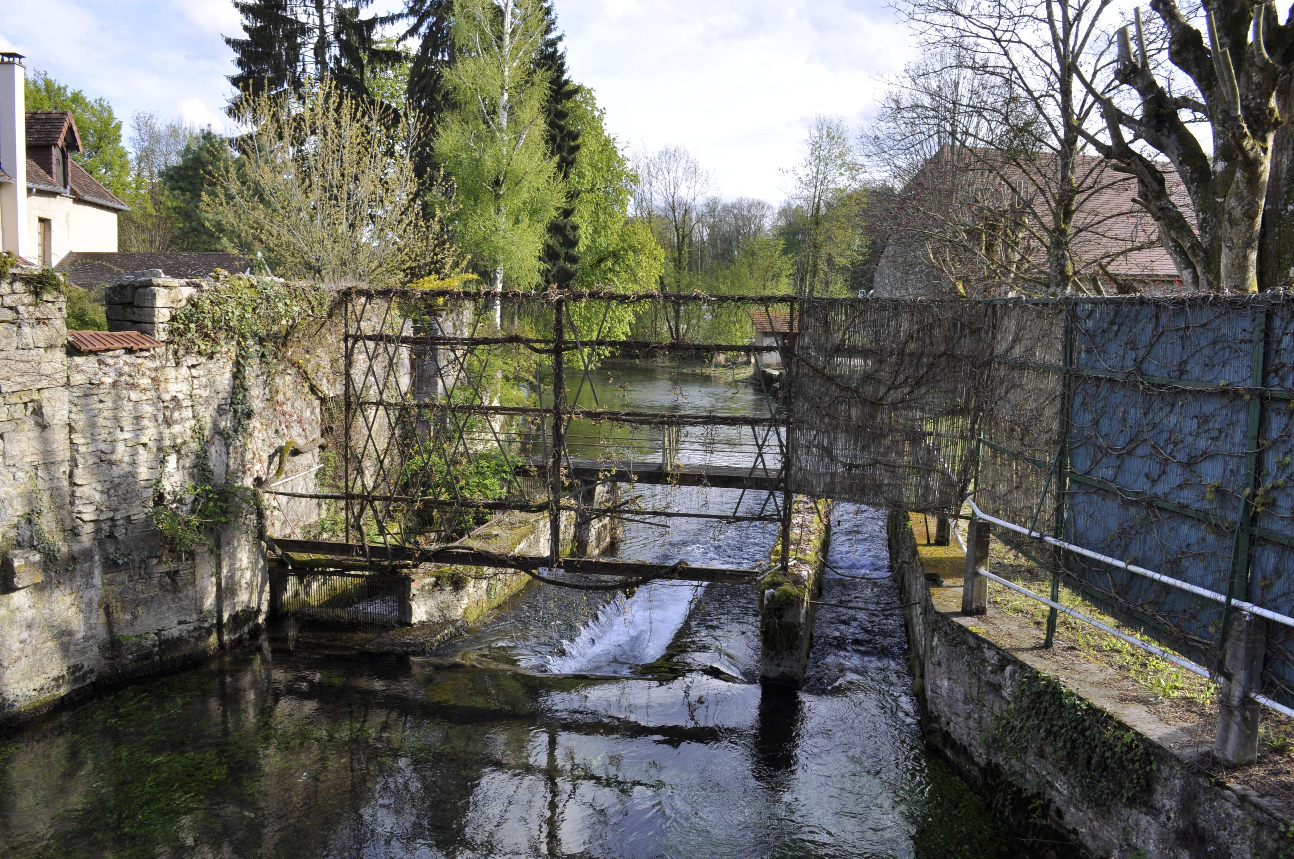 Barrage sur la Bèze à Noiron-sur-Bèze (Côte d'Or).